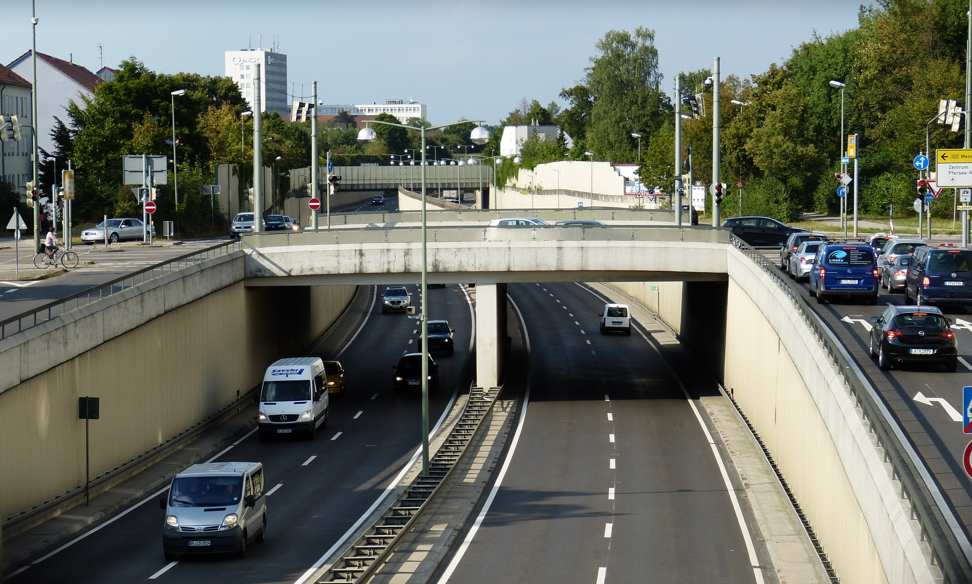 Kreuzung der Bundesstraße 17 (Dayton-Ring, untere Fahrstreifen) mit der Bundesstraße 300 (nach Westen) bzw. Bürgermeister-Ackermann-Straße (nach Osten) in Augsburg-Kriegshaber. Blickrichtung Norden.